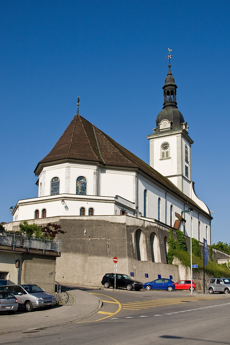 Eglise Saint-Pierre-aux-Liens à Bulle (FR)